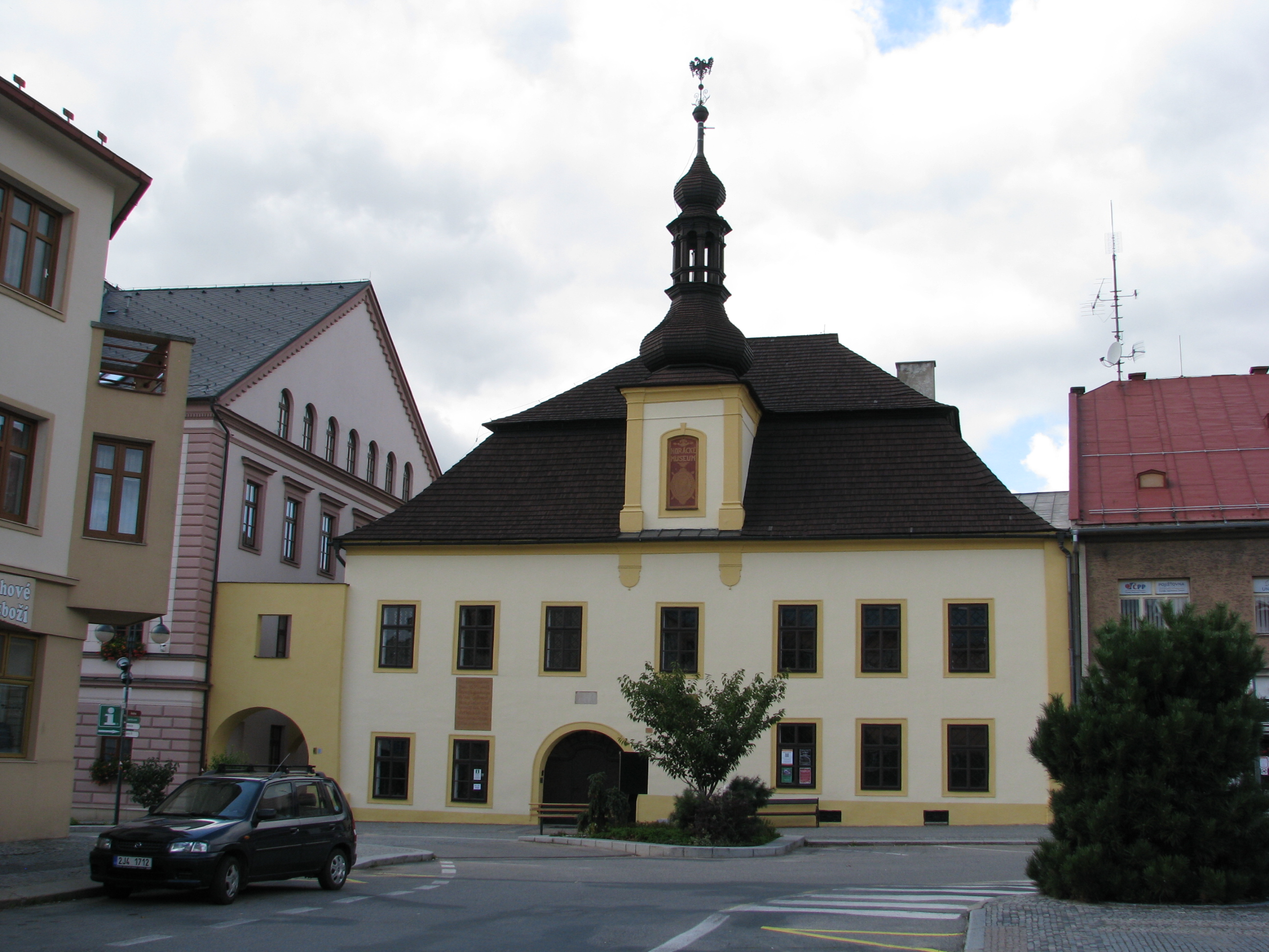 Stará radnice, Vratislavovo náměstí 114, Nové Město na Moravě